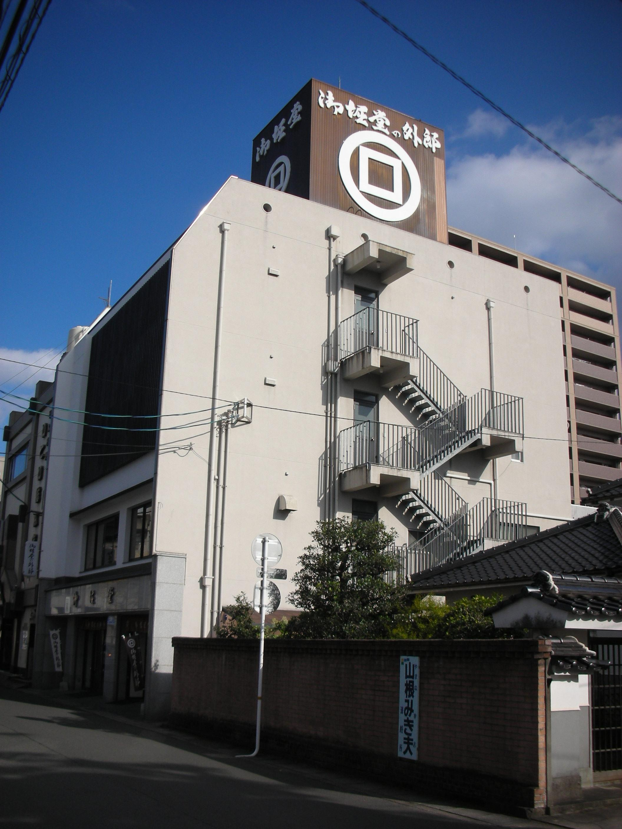 山口市御堀堂本店。